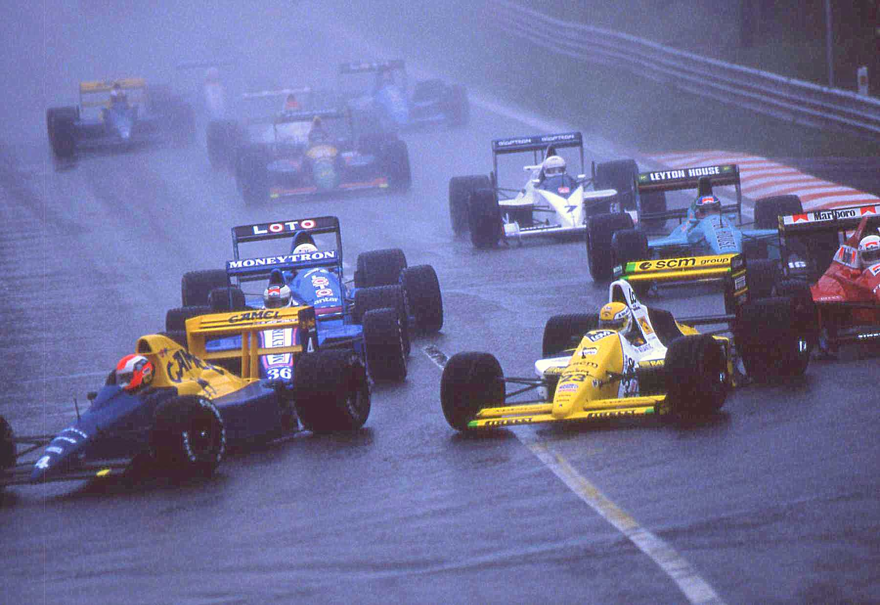 Scan diapo argentique.